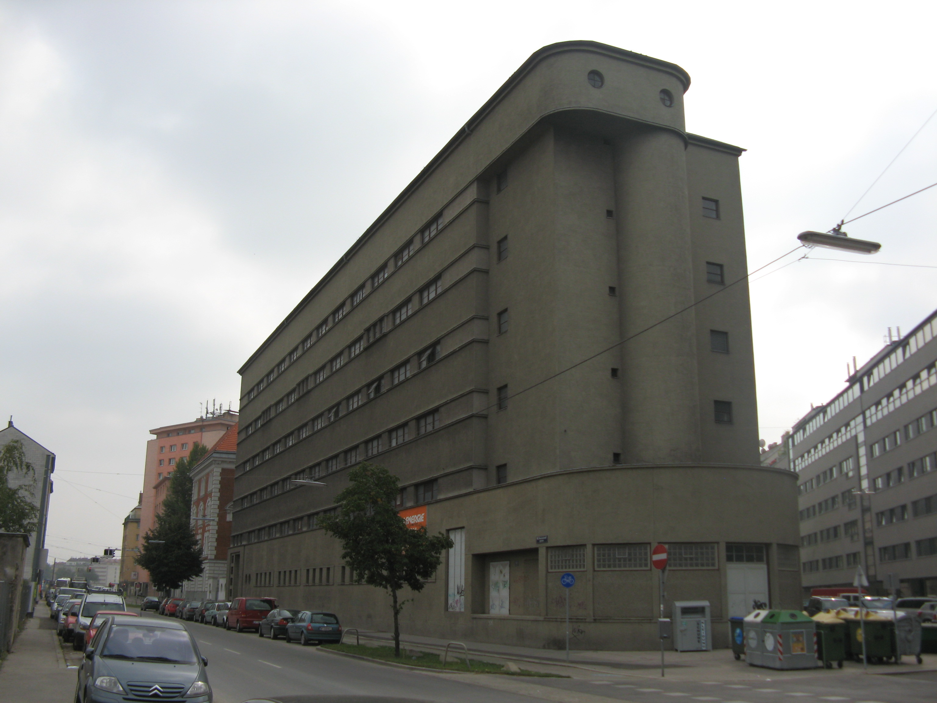 Umspannwerk Favoriten (1929-31) von Anton Grenik, Humboldtgasse 1-5, Wien-Favoriten